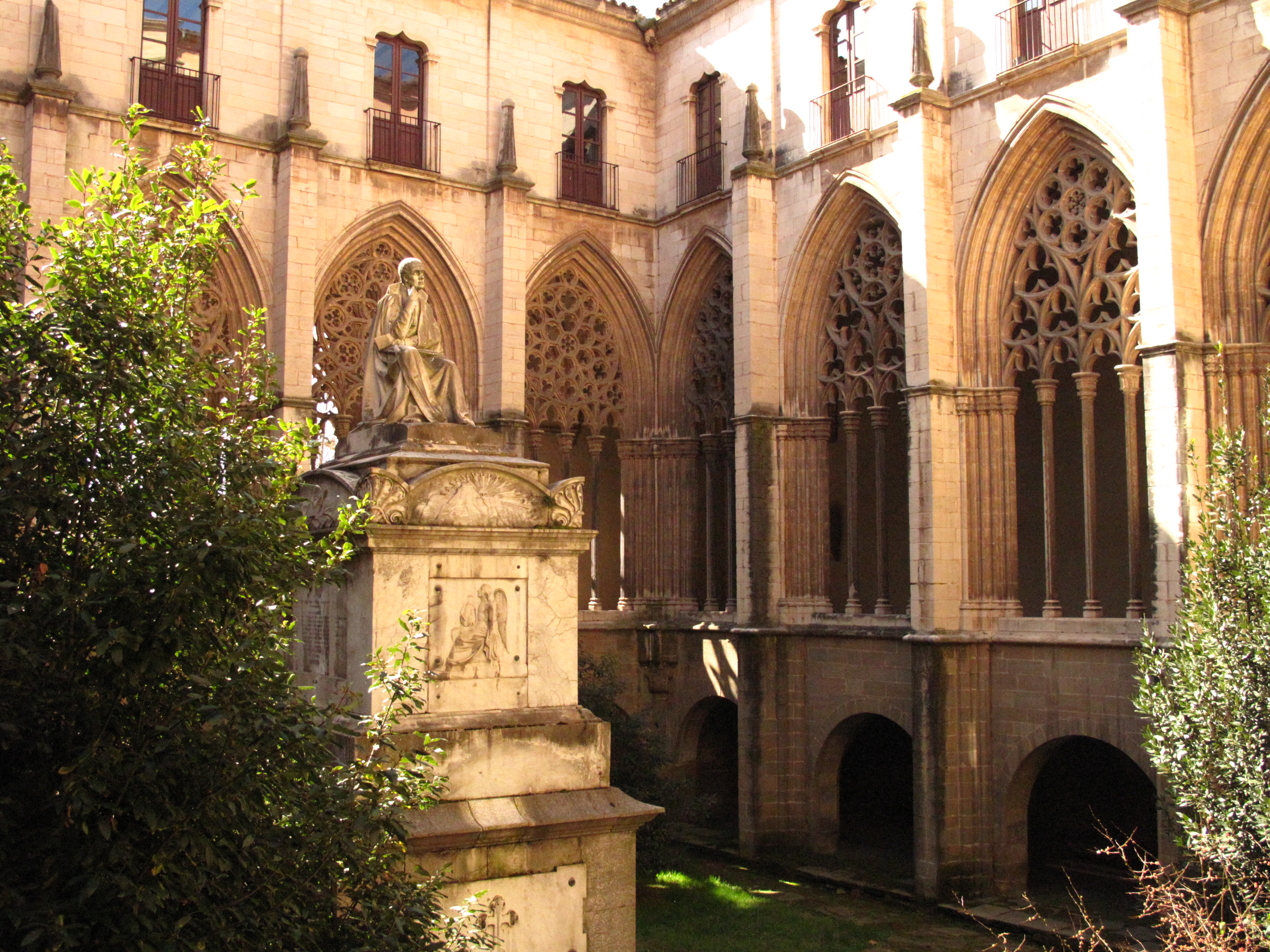 Catedral de Sant Pere (Vic)